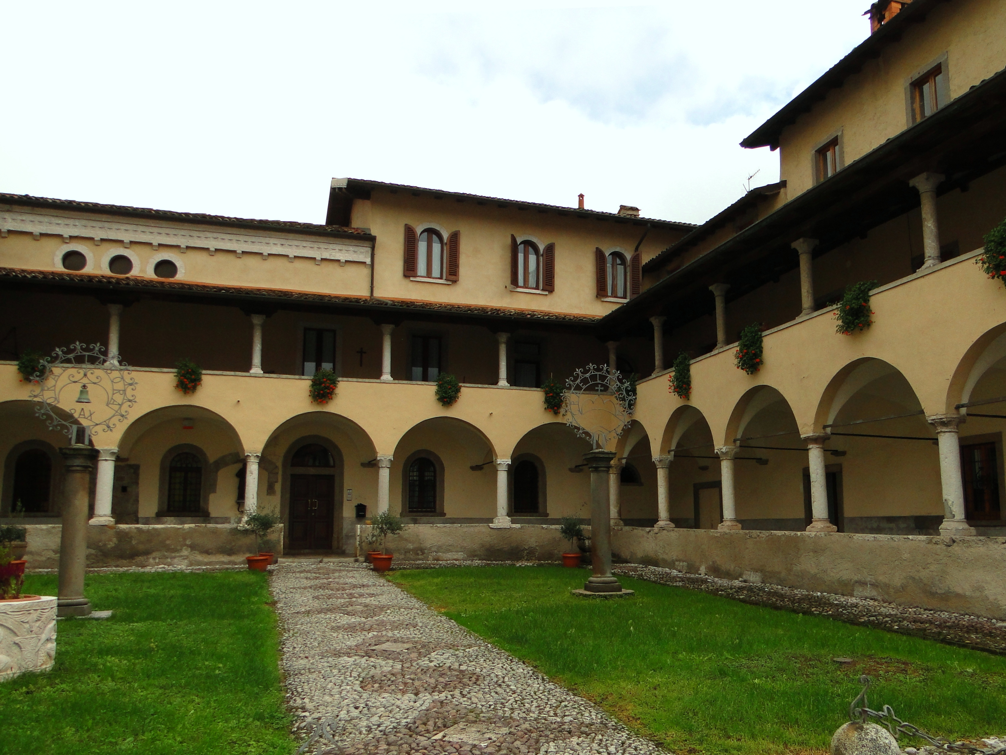 Abbazia san Benedetto in Vallalta, Abbazia di Albino (BG). Chiostro